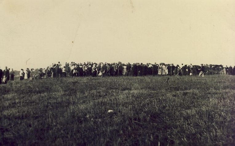 Laisvamanių kapinių atidarymas Kupiškyje 1936 m.